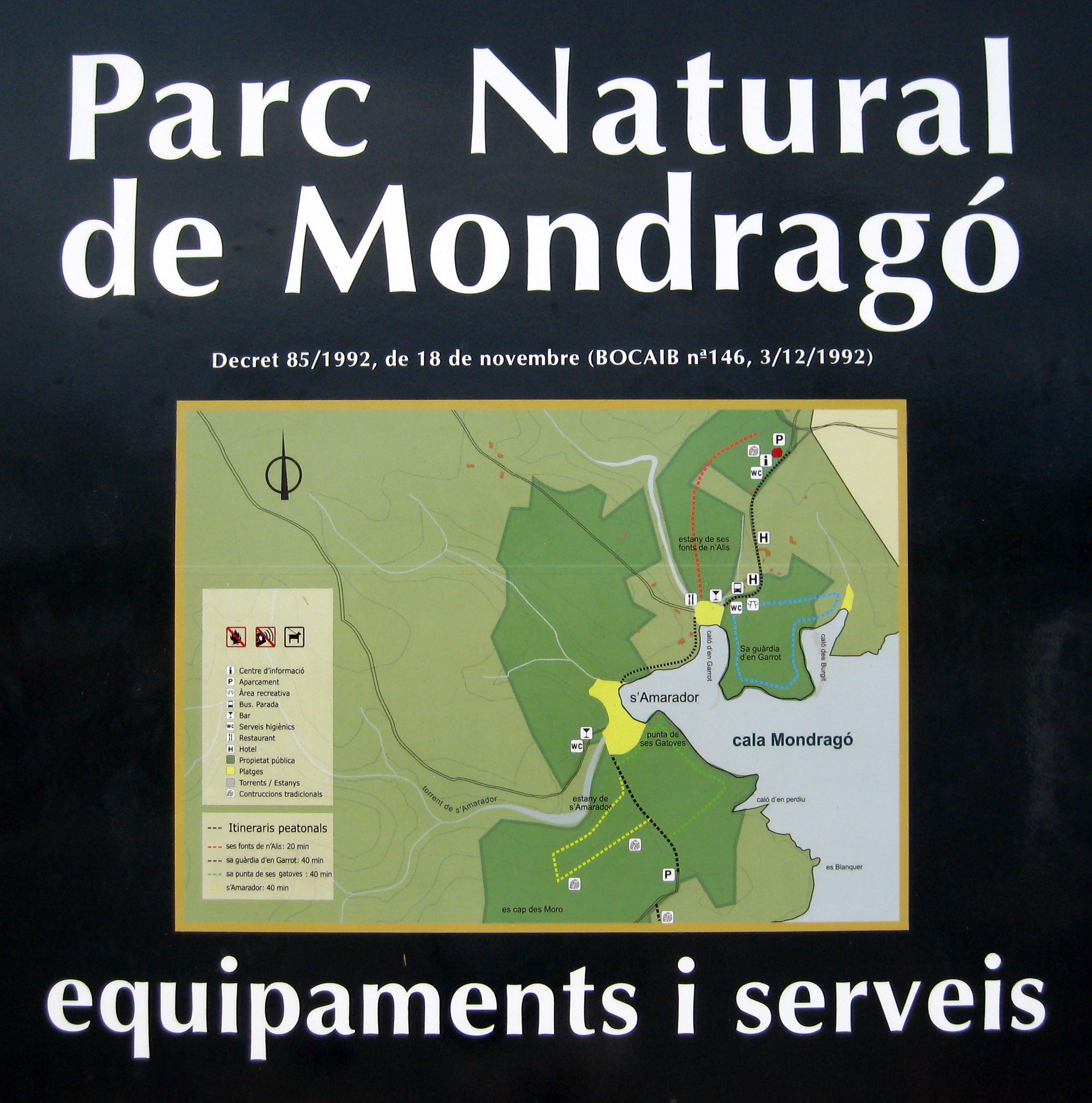 Ausschnitt der Hinweistafel neben dem Informationszentrum des Parc natural de Mondragó oberhalb von ses Fonts de n’Alís, Gemeinde Santanyí, Mallorca, Spanien